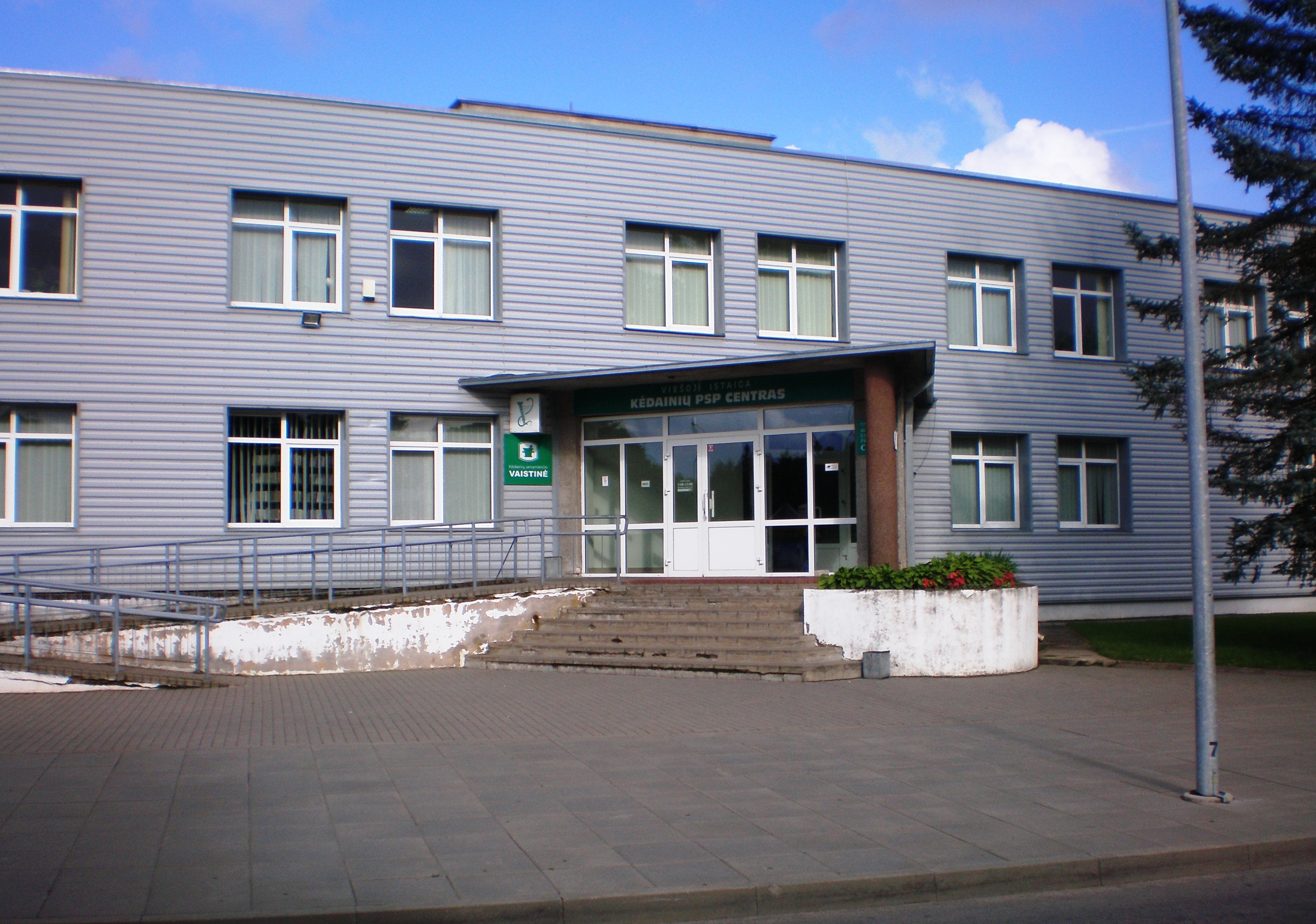 Kėdainių ligoninės poliklinika